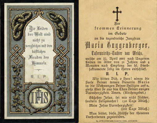 Sterbebild Maria Guggenberger vom 22. April 1887 aus eigener Sammlung. Das Bild wurde an alle Trauergäste bei der Beerdigung 1887 verteilt.